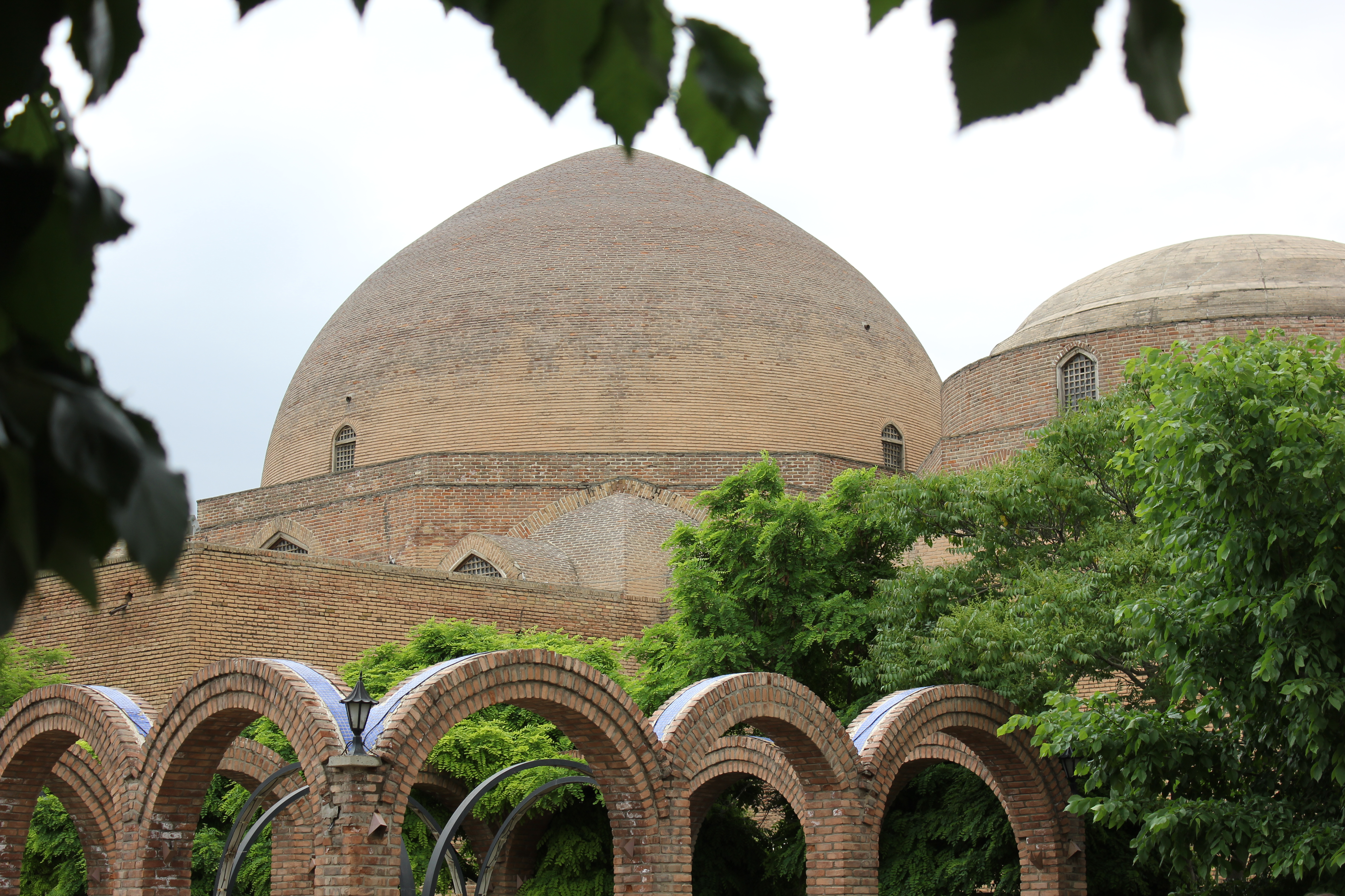 مسجد کبود